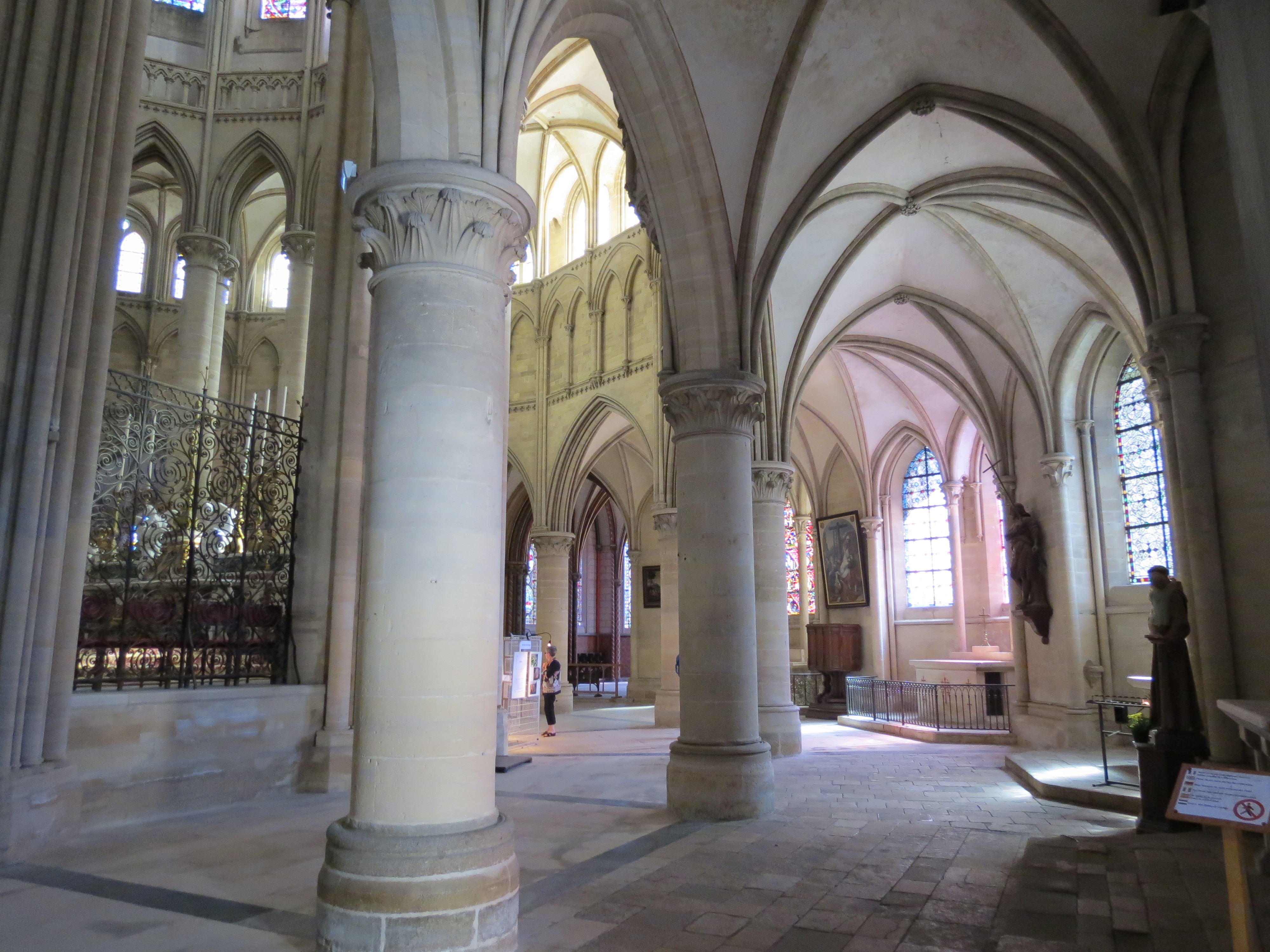 Déambulatoire et chapelles de la cathédrale de Coutances.